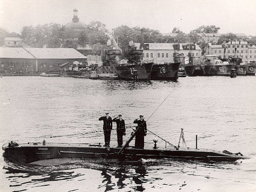 Sous-marin de poche suédois Spiggen ( ex- X51 Stickleback britannique)